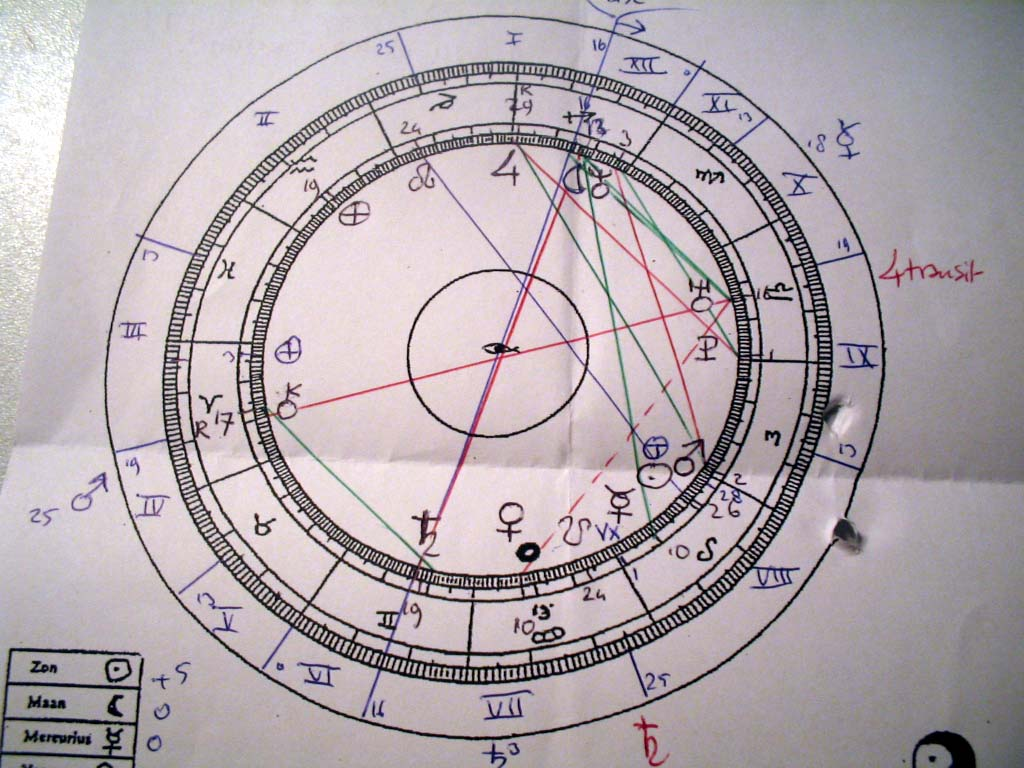 horoscoop